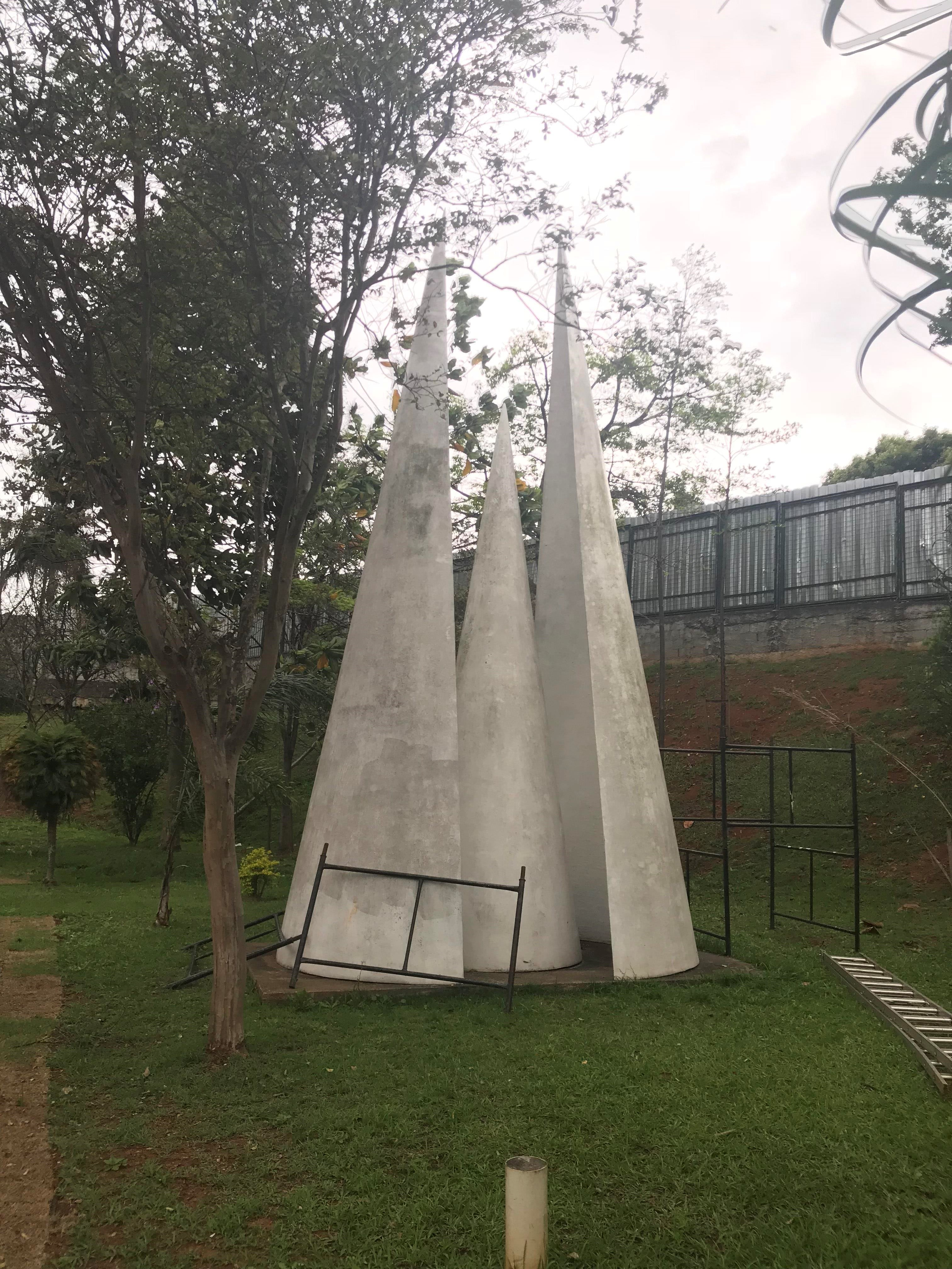 Monumento Ogô, pela artista Tatti Moreno, situado na Estação Tucuruvi, Linha 1- Azul. Material: Aço, resina de polietileno, tinta epóxi - Dimensões: 7,00m x 3,30m.